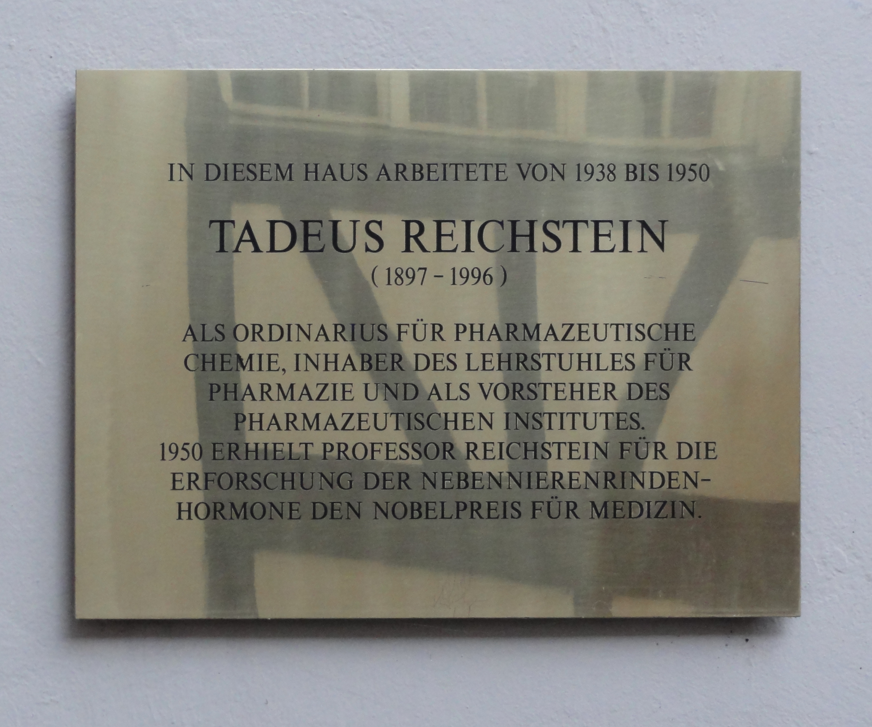 Basel — ?